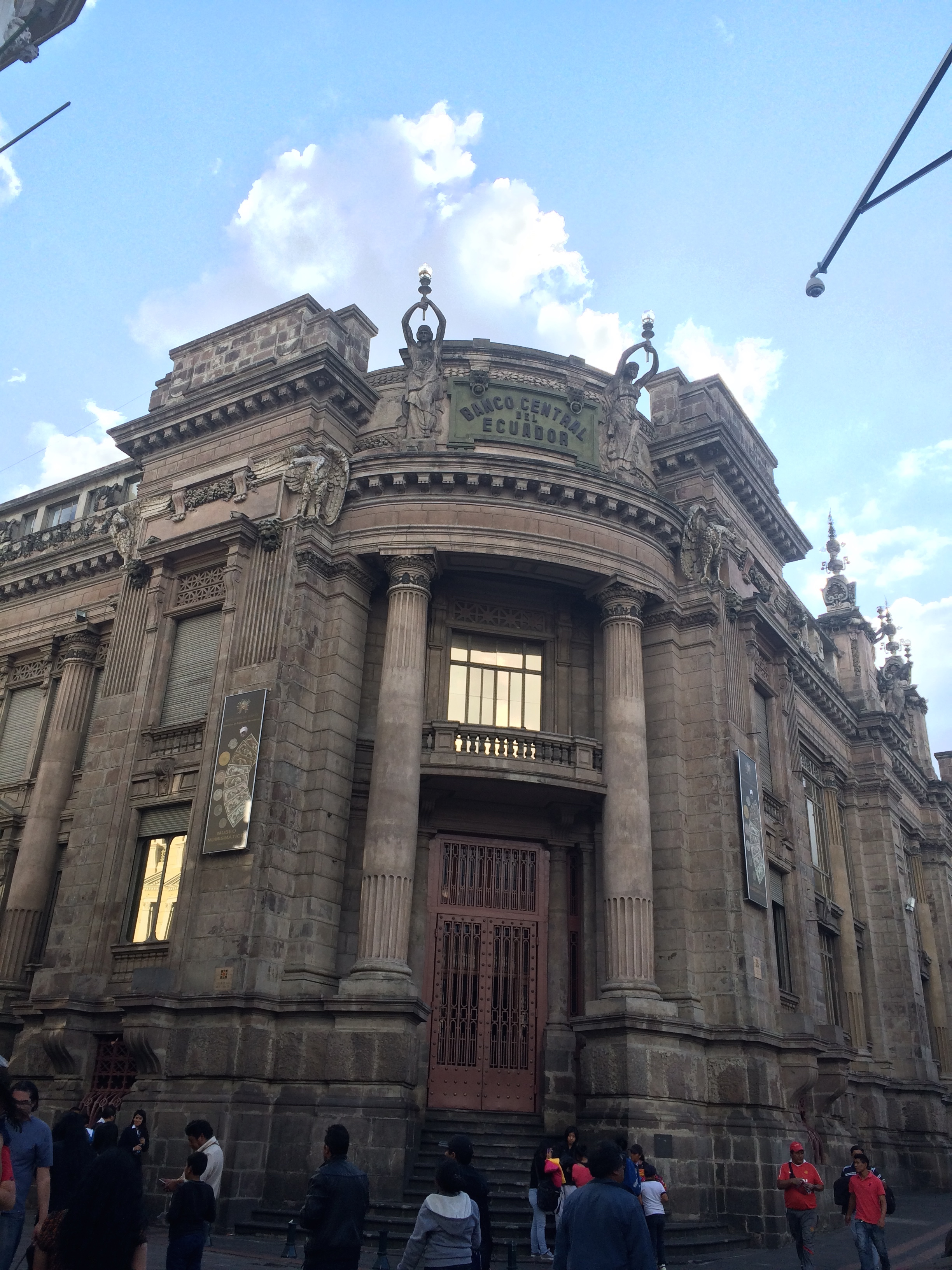 Banco Central del Equador, Quito - Equador